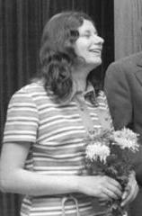 Title: Berlin, Sportler des Jahres geehrt People in the image: Helga Seidler: deutsche Leichtathletin und Olympiasiegerin, DDR Factual corrections and alternative descriptions are encouraged separately from the original description. Additionally errors can be reported at this page to inform the Bundesarchiv. Original historic description: ADN-ZB-Katscherowski-20.12.72-Sue-Berlin :Sportler des Jahres geehrt-Im Kinosaal des Fernsehturms am Alexanderplatz wurden am 20.12.72 die durch die Sportlerumfrage der "Jungen Welt" für 1972 ermittelten "DDR- Sportler des Jahres" geehrt. V.l.n.r.: Helga Seidler, Wolfgang Nordwig, Rita Kühne, Renate Stecher, Klaus Köste, Roland Matthas, Monika Zehrt, Kornelia Ender und Dagmar Luenenschloß-Käsling. (Weiteres siehe ADN-Meldg.)